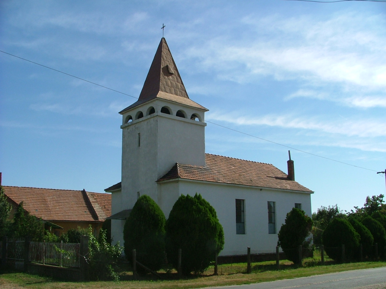 evangélikus templom